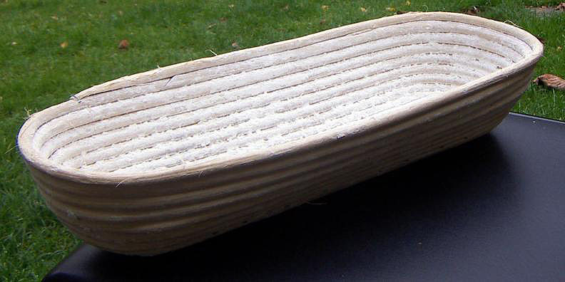 Gärkörbchen